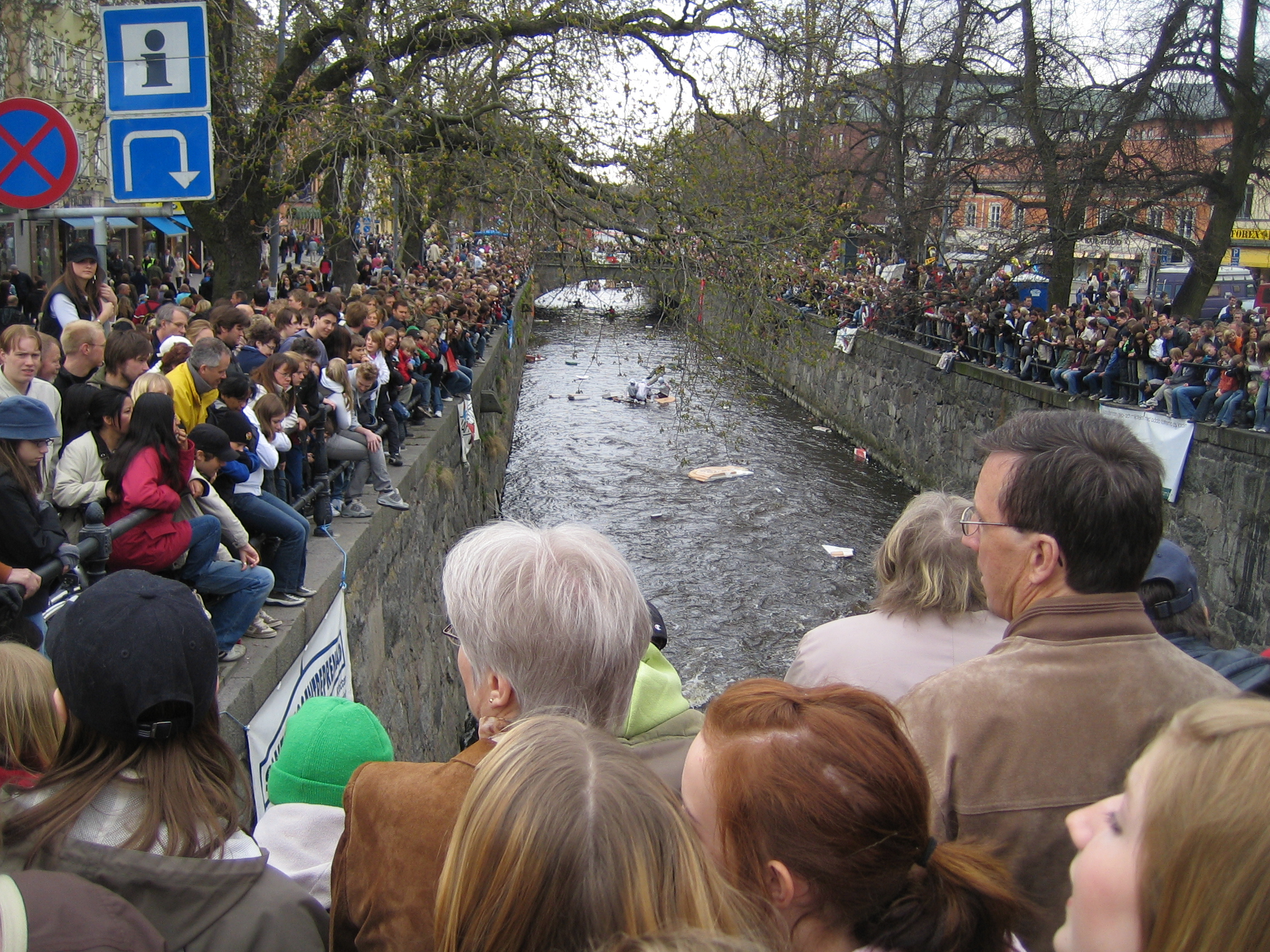 Forsränning i Fyrisån, Valborg 2005